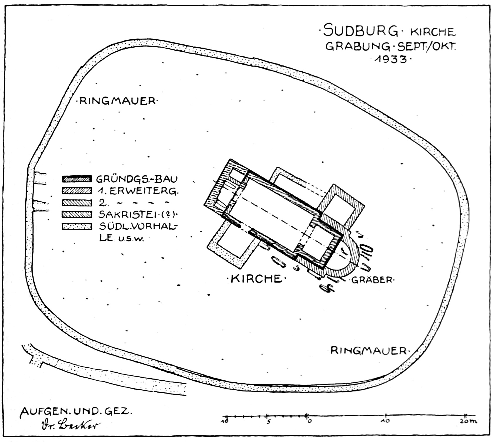 Goslar-Oker, Grabungsskizze der Sudburg-Kirche, 1933